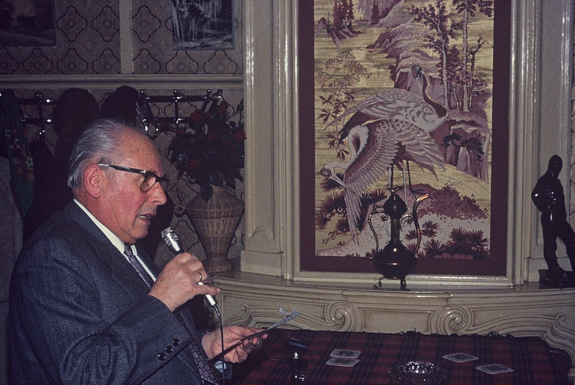 René Balleux en 1974, dum li prezentis la financan raporton de la antverpena Esperanto-grupo. Propra foto.